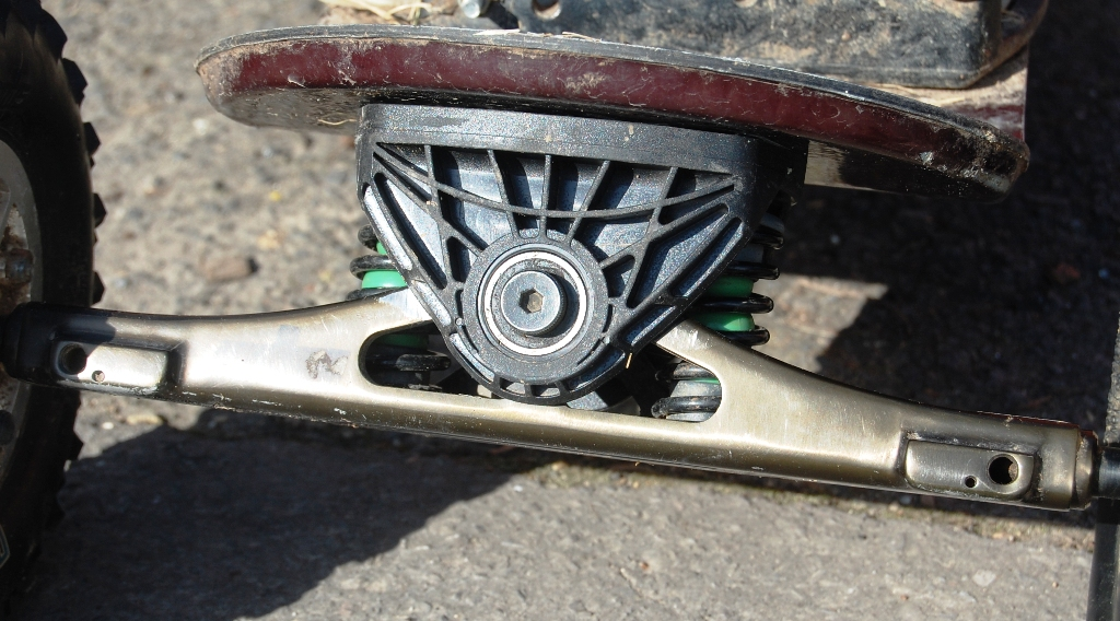 Eje channel